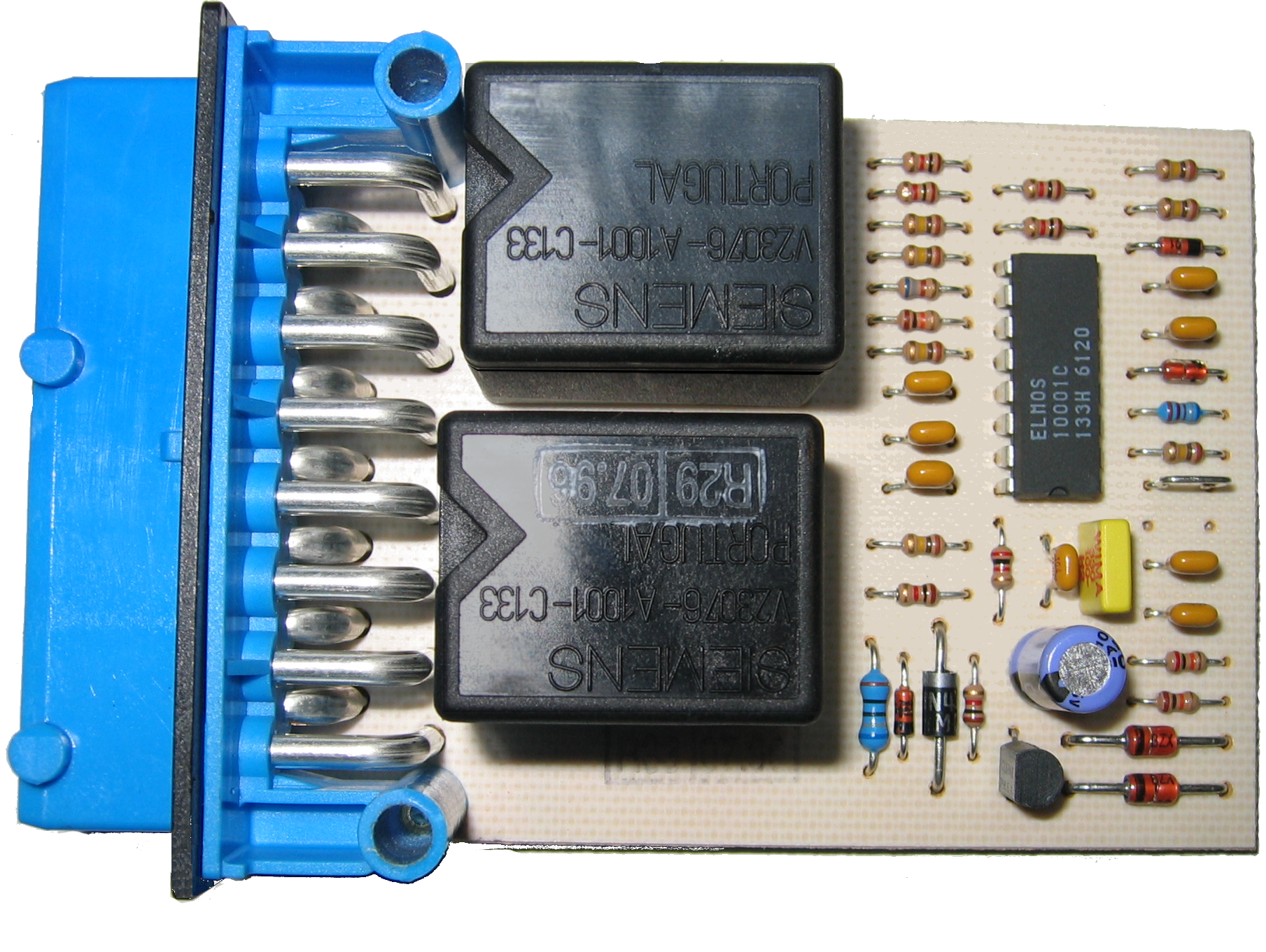 Wischermodul (Wischerrelais)